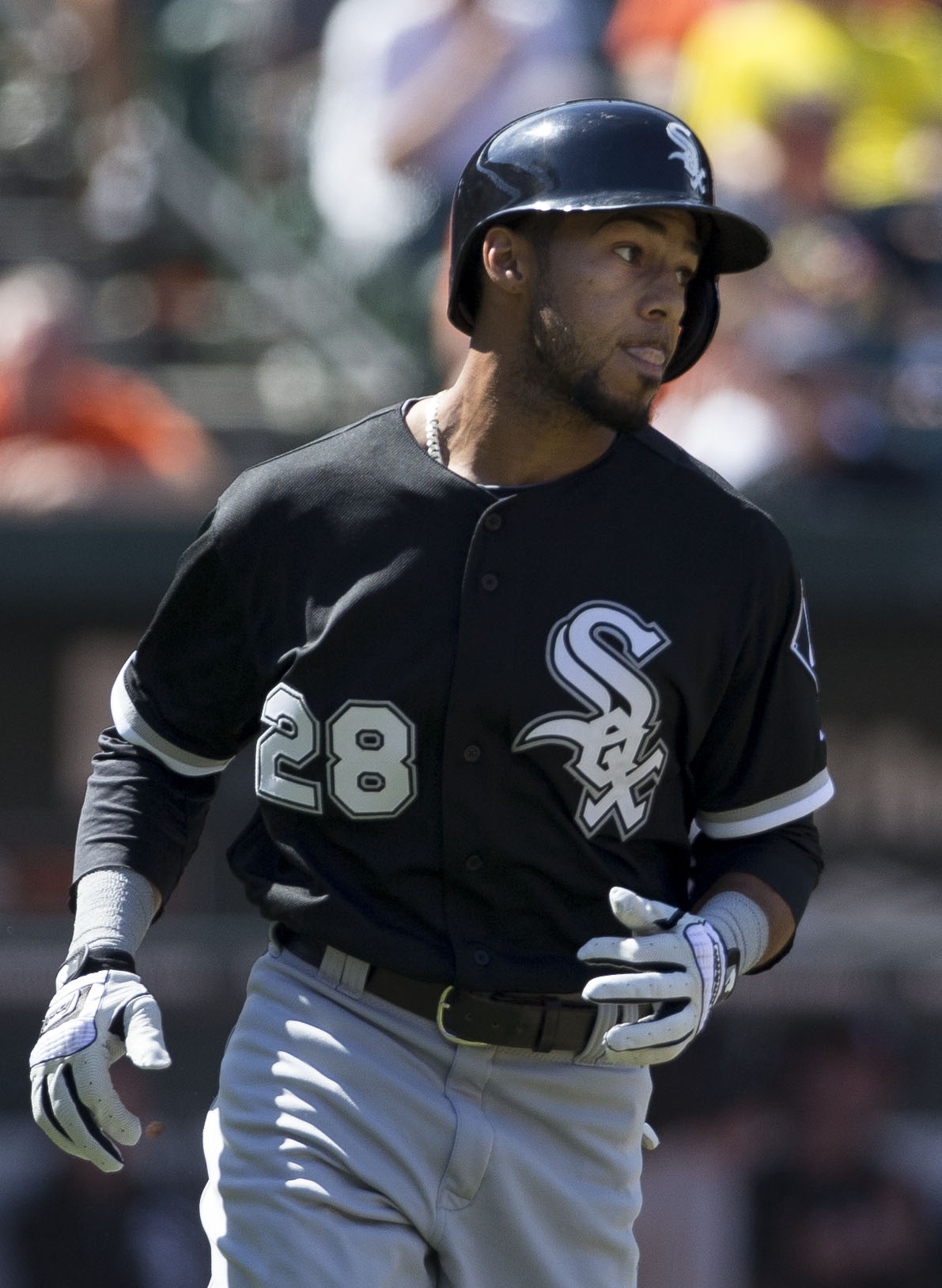 Leury García